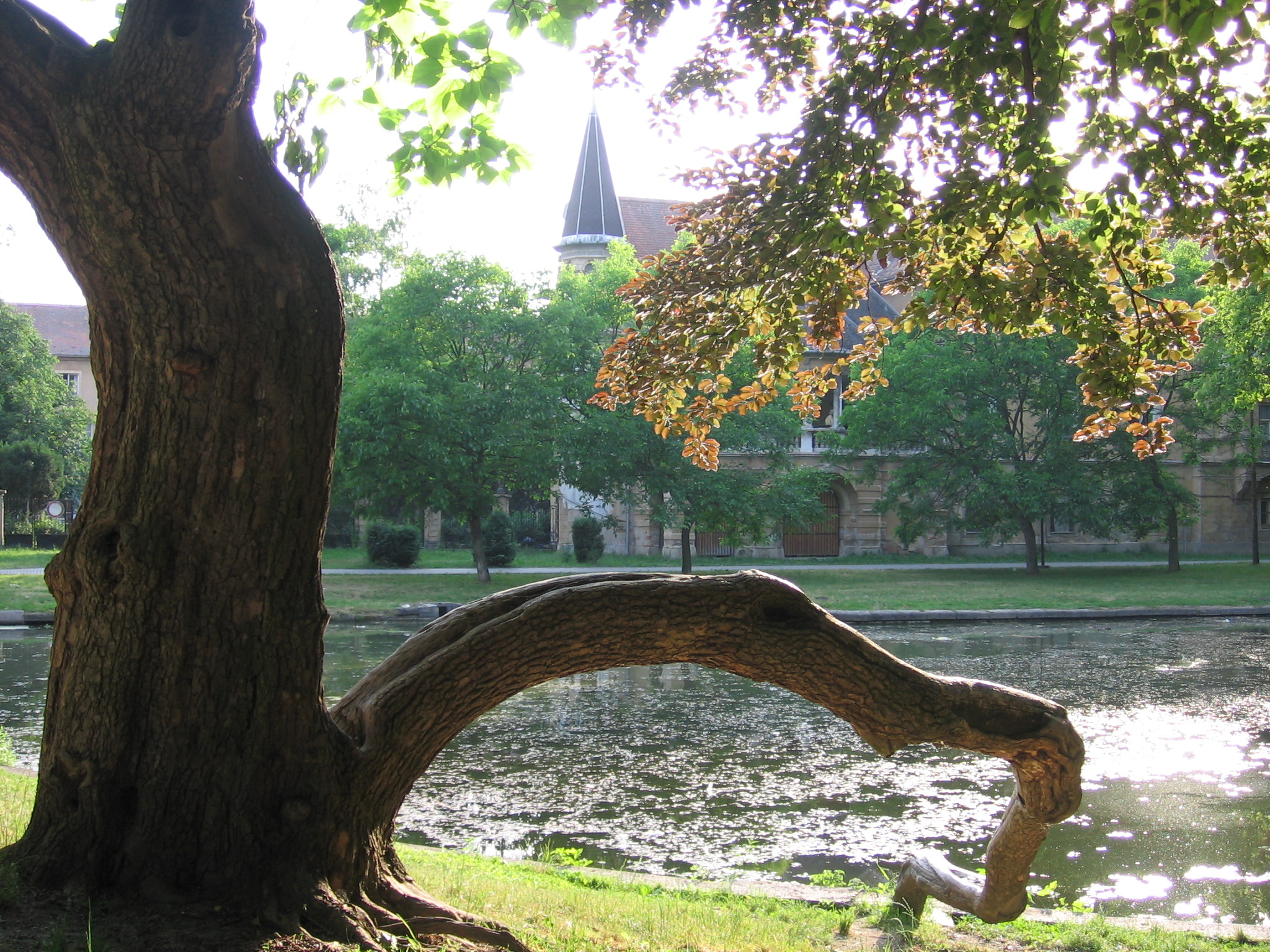 Kategória:Panorámy Kategória:Presunúť na Commons